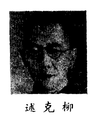 中文（中国大陆）: 制憲國民大會代表